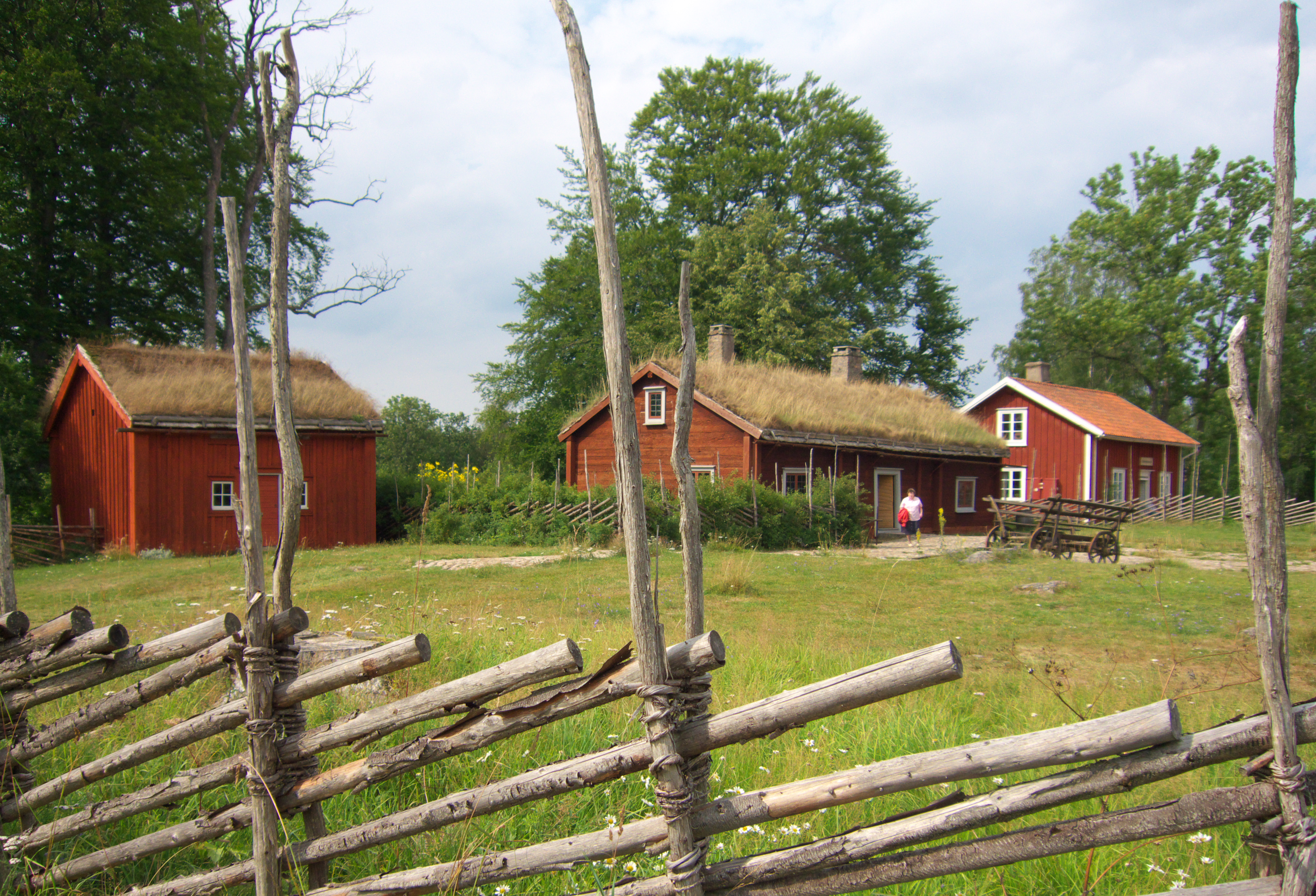 Kulturreservatet Linnés Råshult